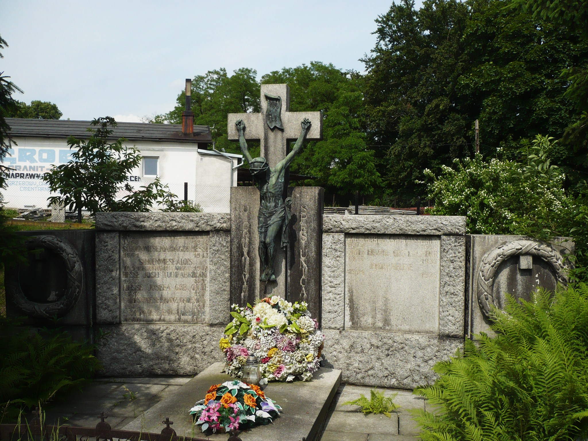 Nowa Ruda, ul. Cmentarna - cmentarz komunalny (pomnik)